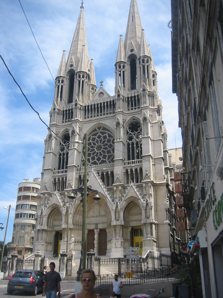 The Église des Réformés church in Marseille, France. Source: Jaakko Sakari Reinikainen (ulayiti)